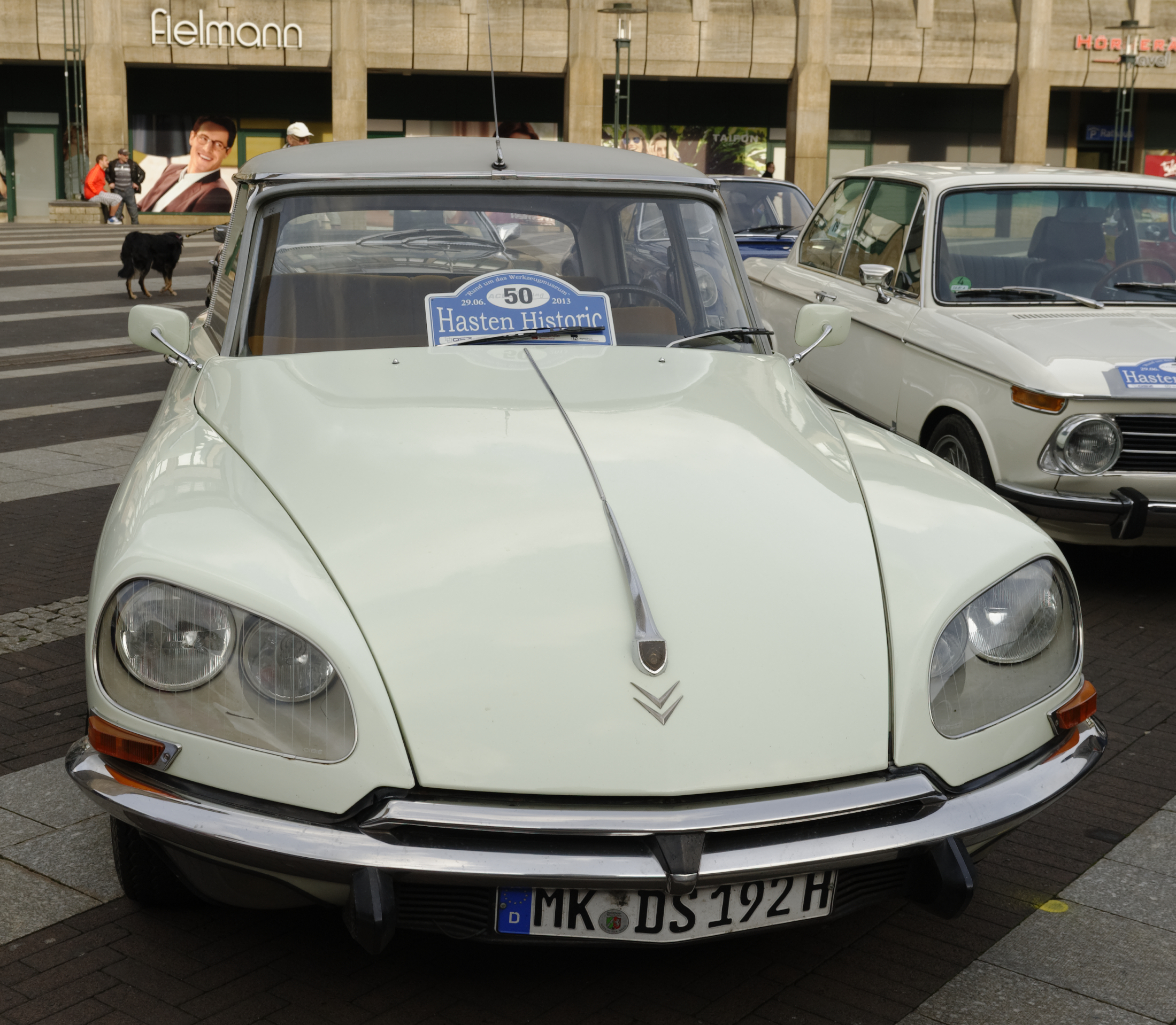 Oldtimershow in Remscheid Juni 2013